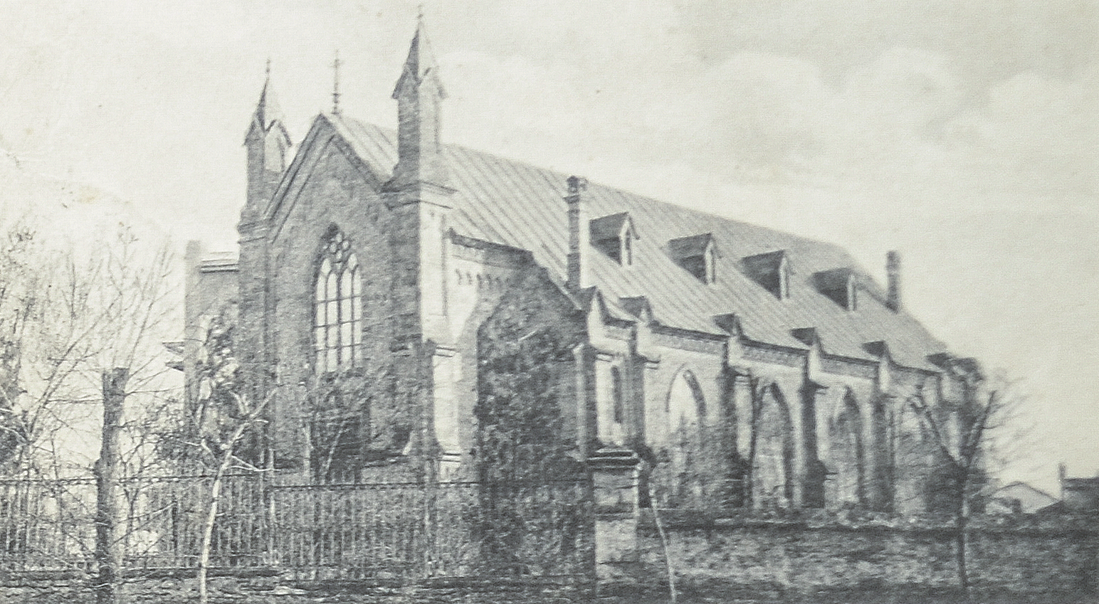 Лютеранська кірха (Херсон, вул. Лютеранська 1), фото невідомого автора до 1914 року